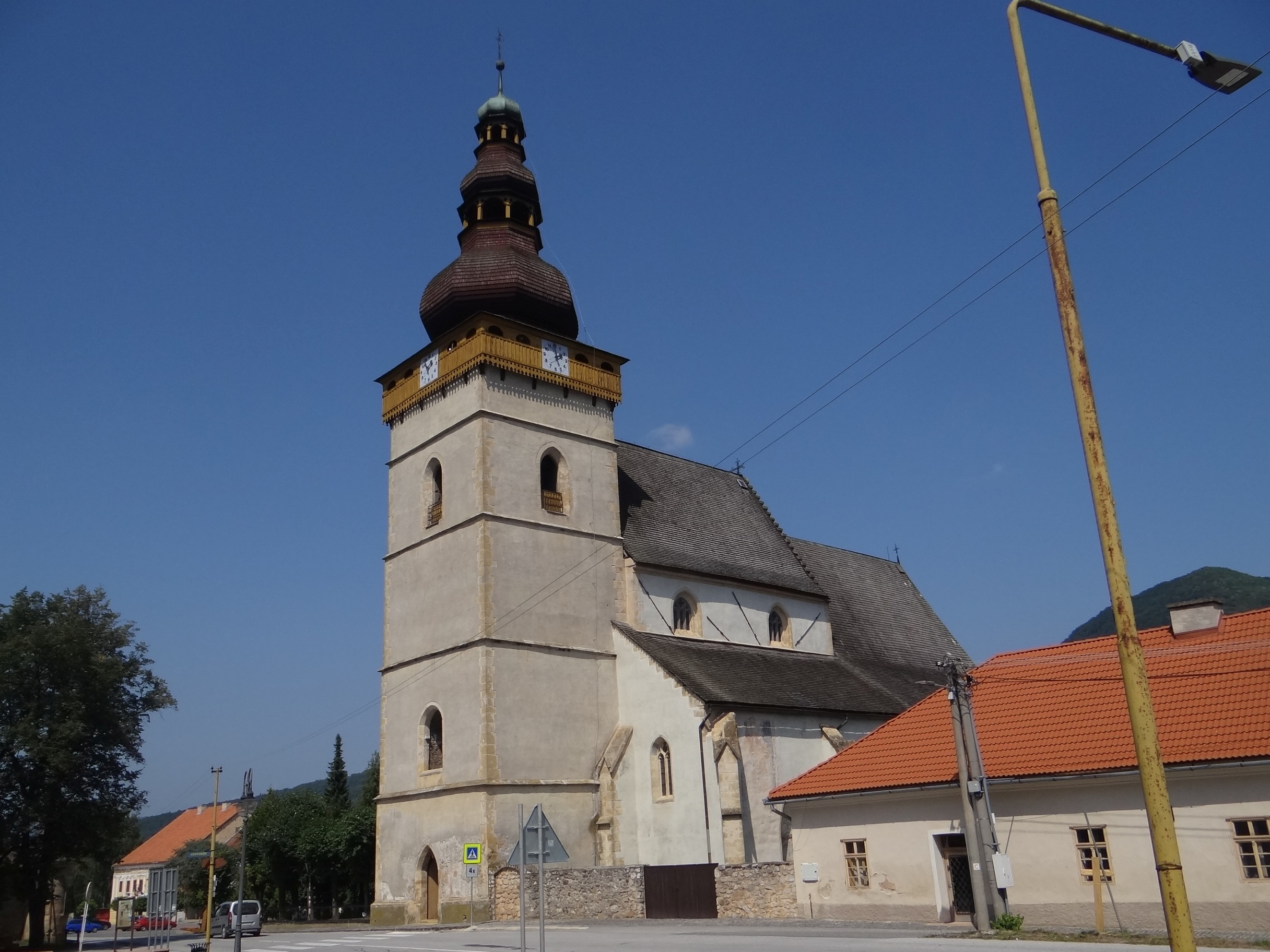 Štítnik